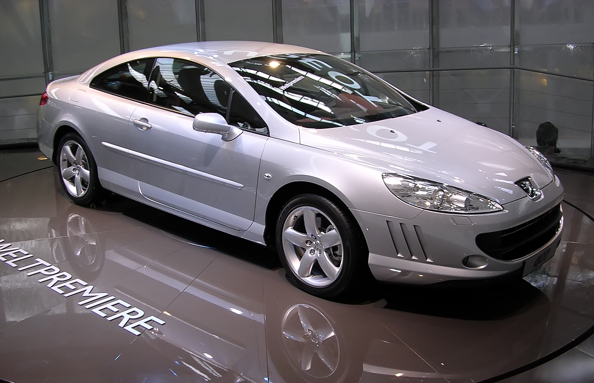 Peugeot 407 Coupé Weltpremiere auf der IAA 2005